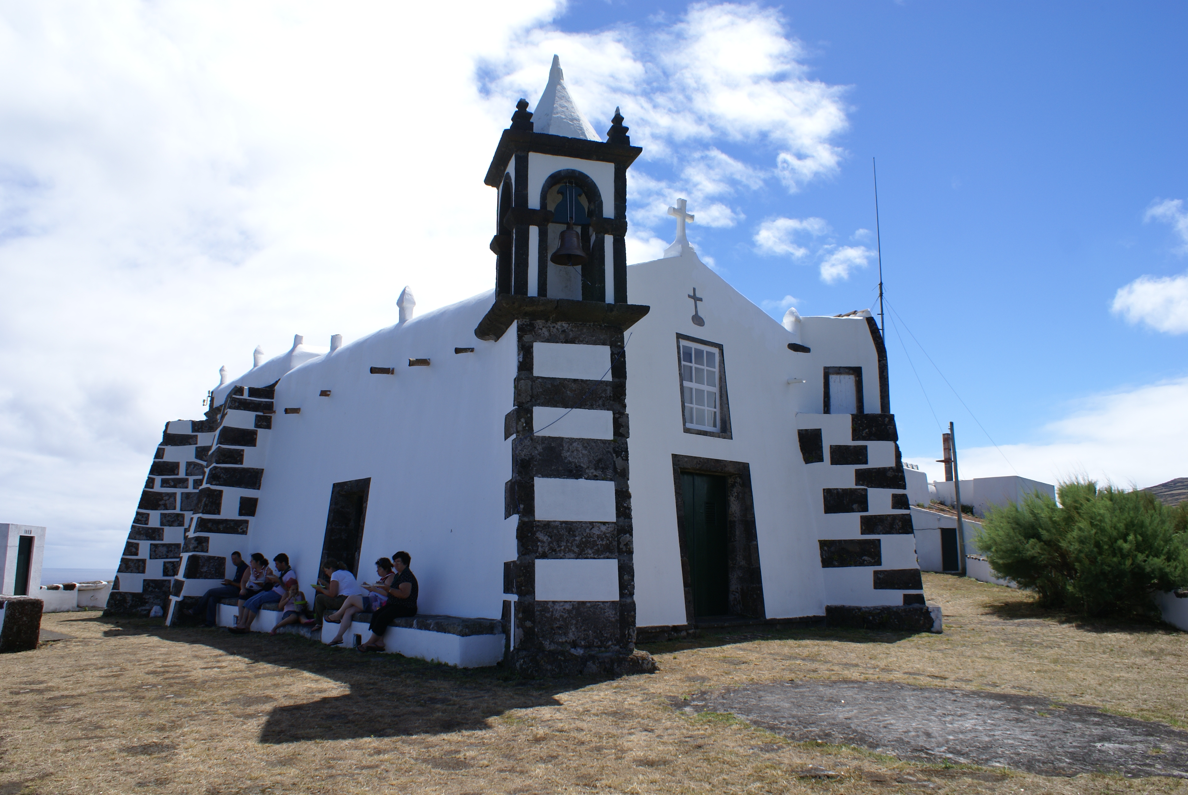 Ermida de Nossa Senhora da Ajuda, Monte da Ajuda, Santa Cruz da Graciosa, ilha Graciosa, Açores, Portugal